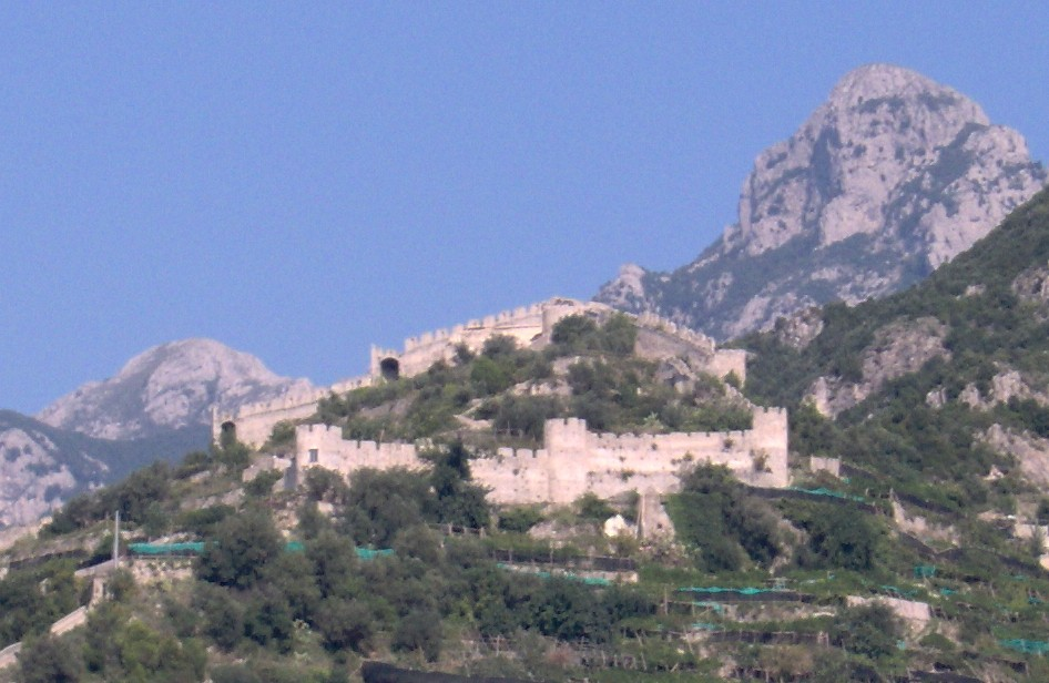 Maiori, Italy, San Nicola di Thoro Plano